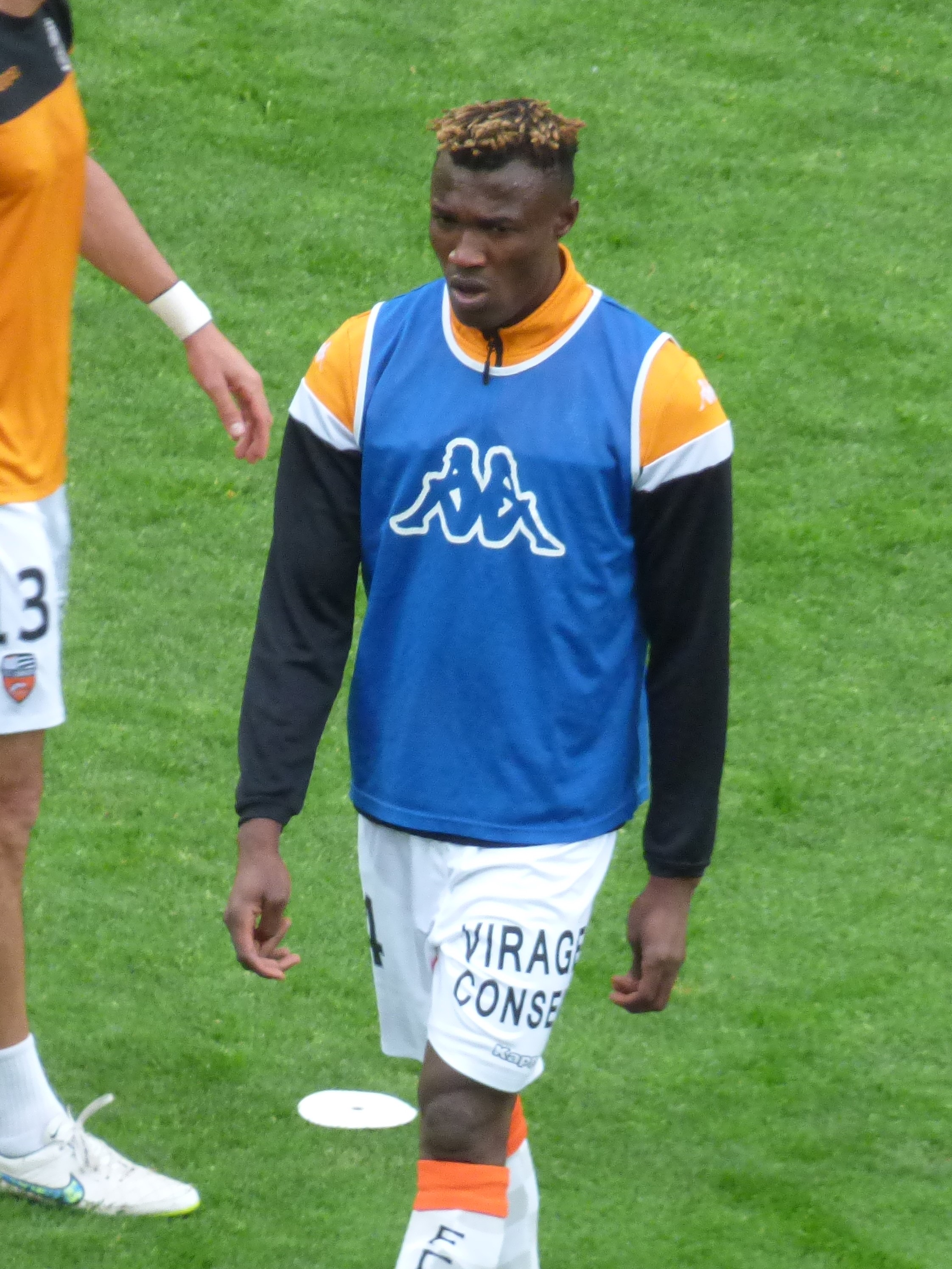 Franklin Wadja avant le match RC Lens / FC Lorient, comptant pour la 34ème journée du championnat de France de Ligue 2 de football 2018-2019, le 23 avril 2019, au Stade Bollaert-Delelis.